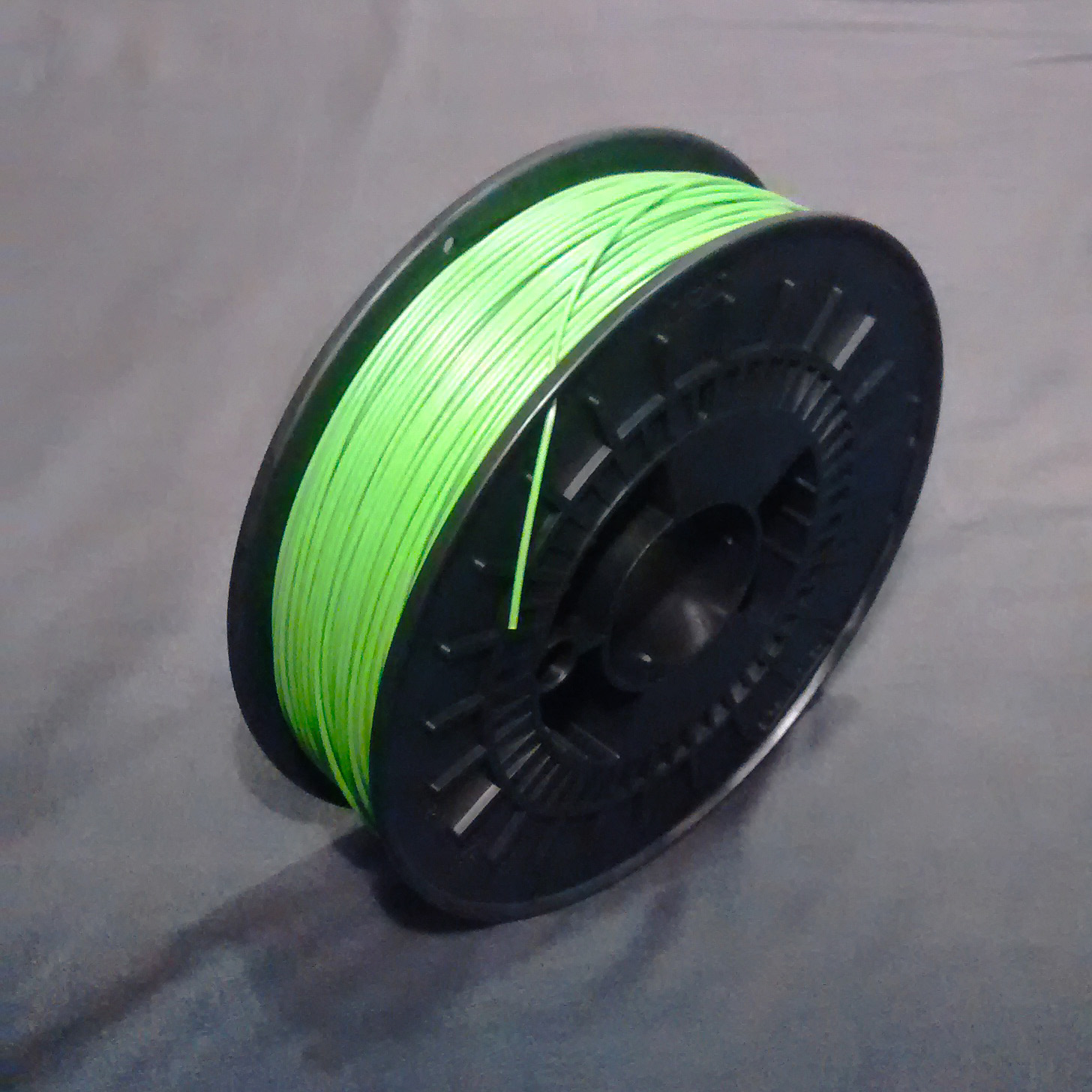 Zöld ABS műanyagszál